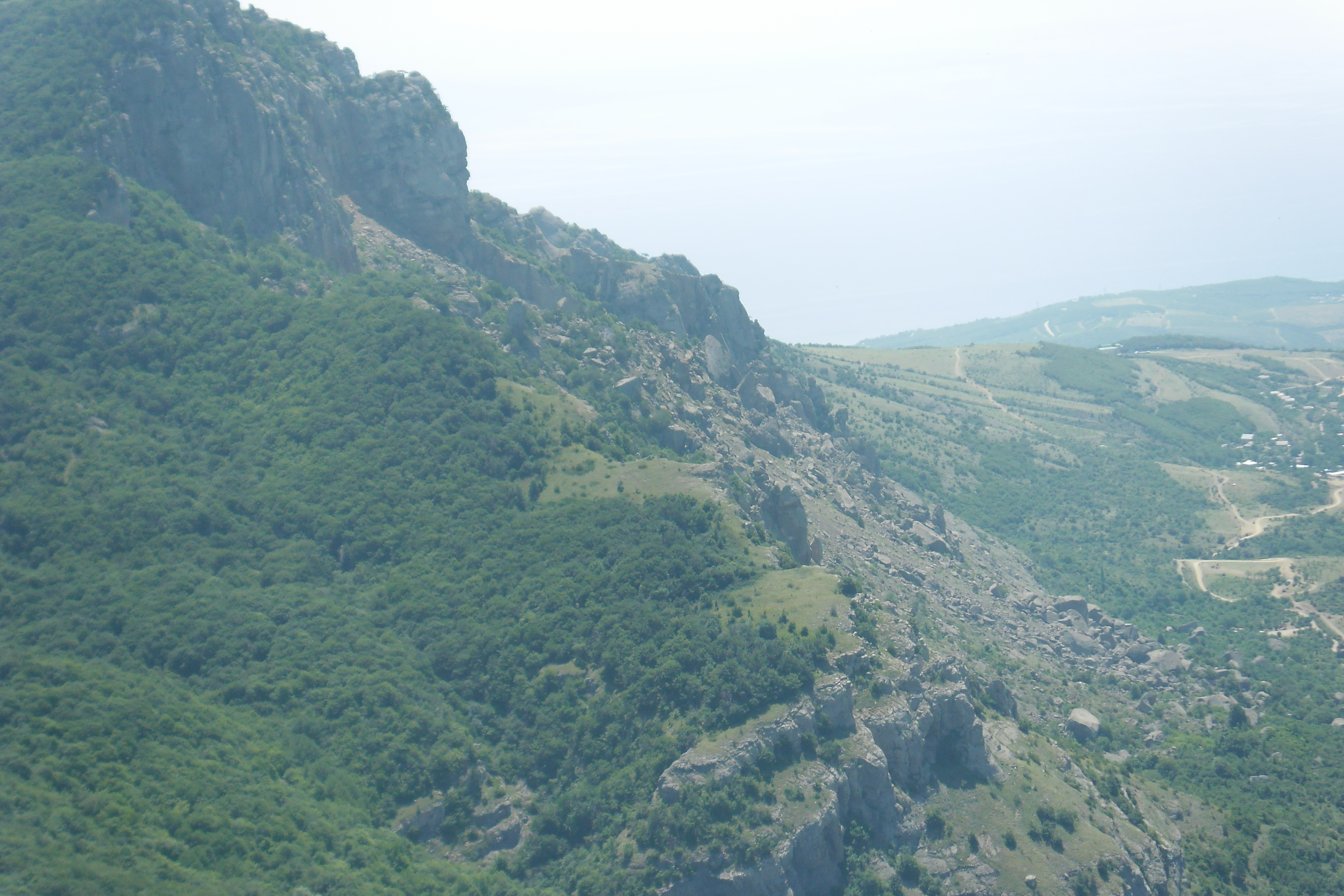 Фото